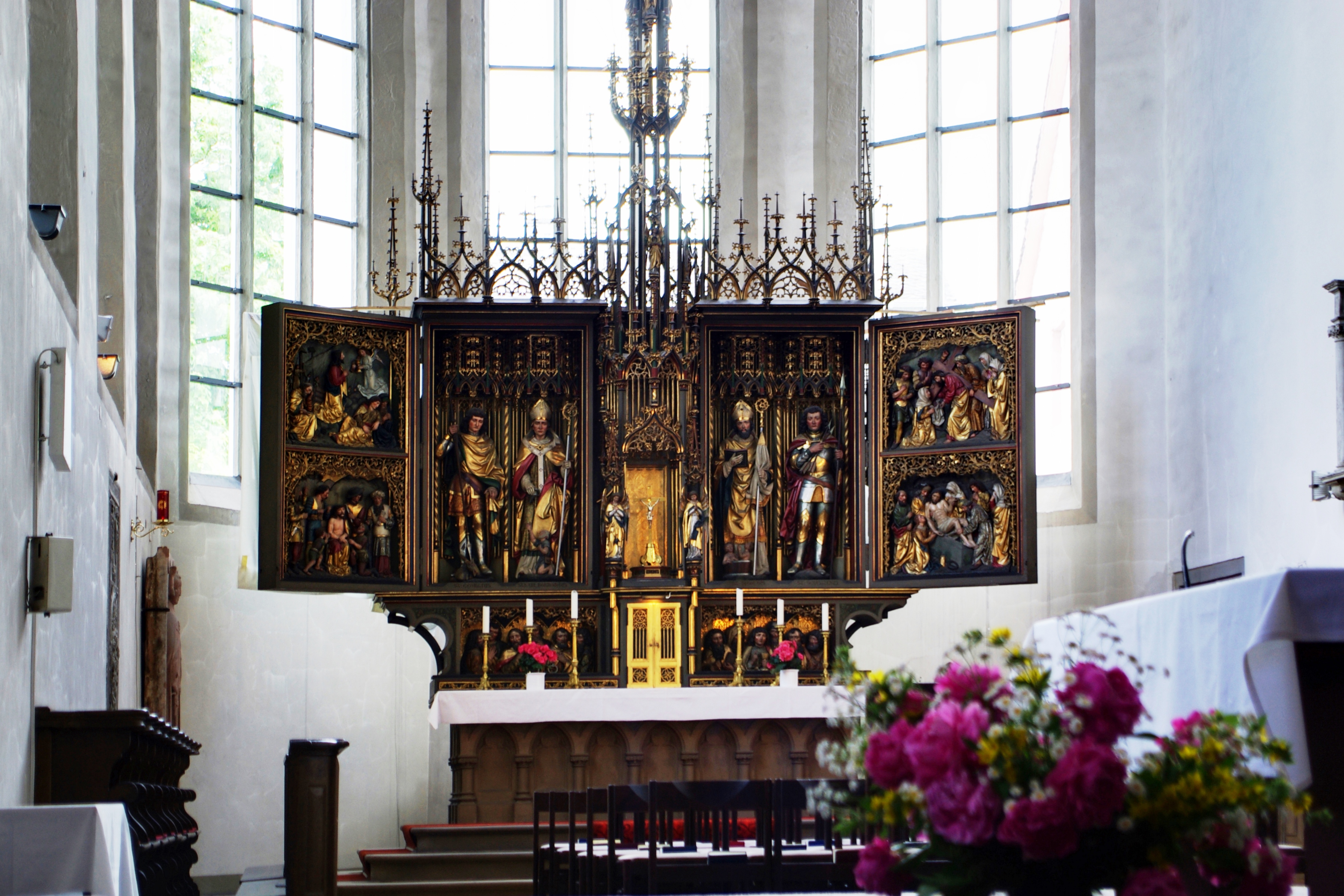 Limburg, Stadtkirche St. Sebastian, Flügelaltar